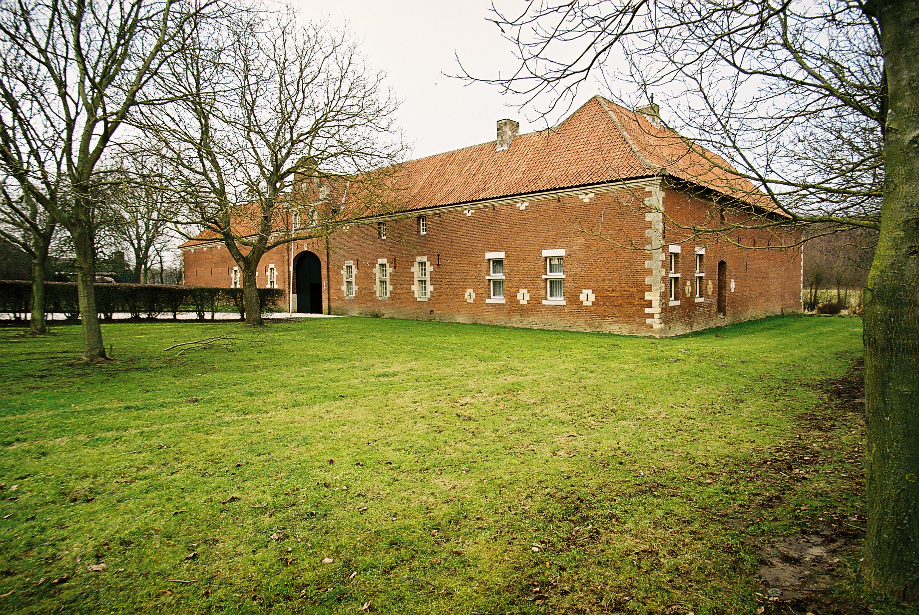 De voorburcht van het verdwenen kasteel Etzenrade.